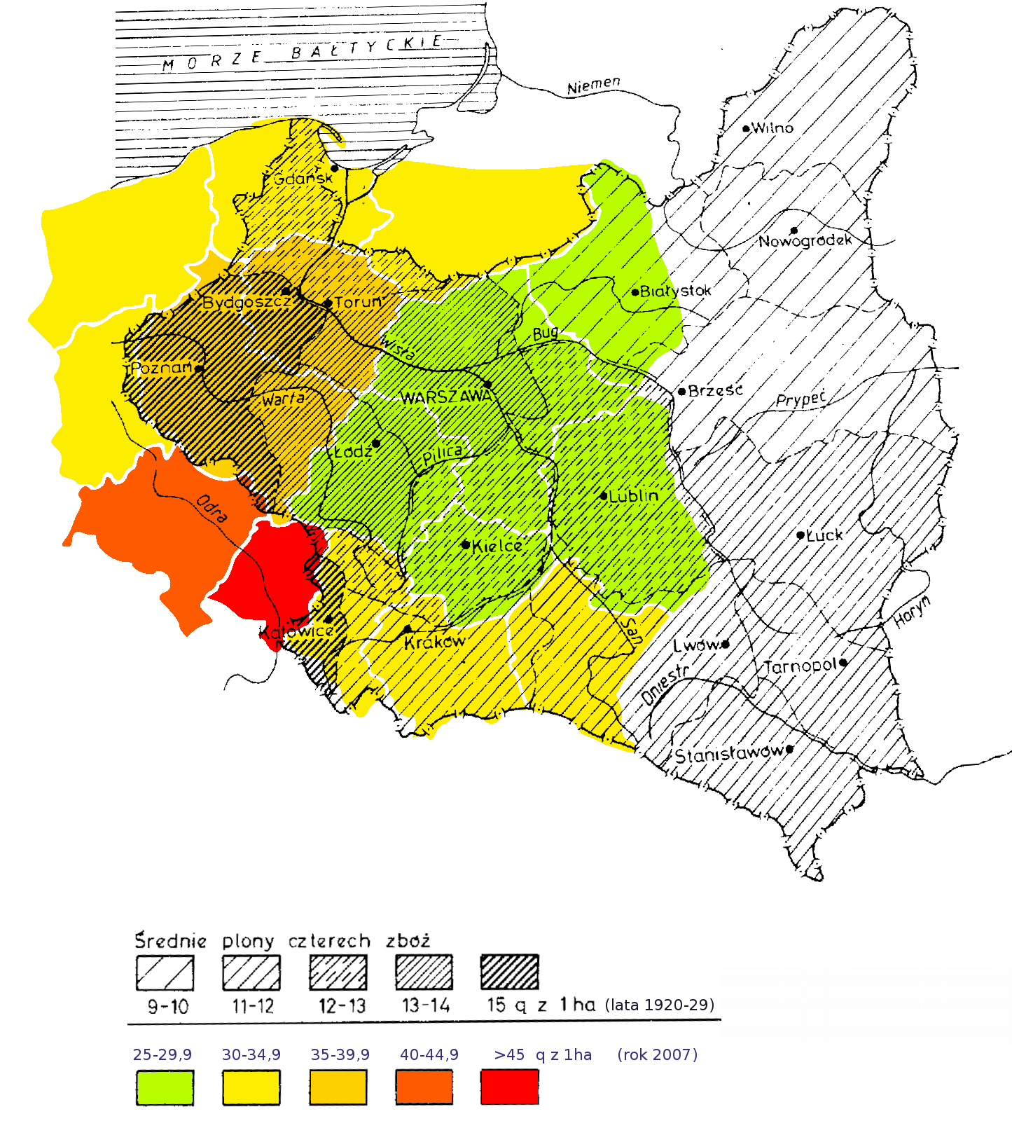 średnie plony 4 zbóż w poszczególnych województwach w Polsce w latach 20. XX wieku i w roku 2007